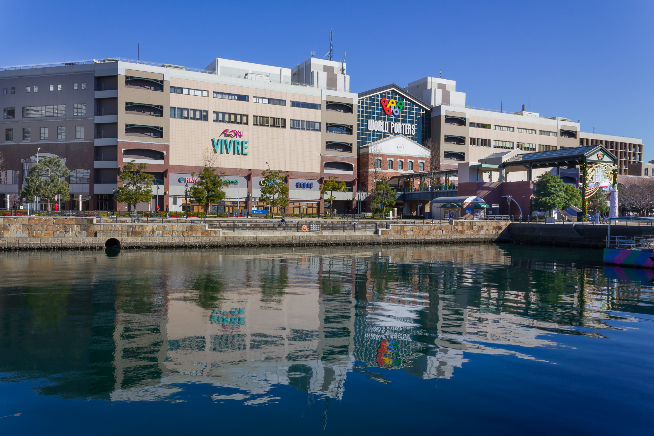 Yokohama World Porters 2012